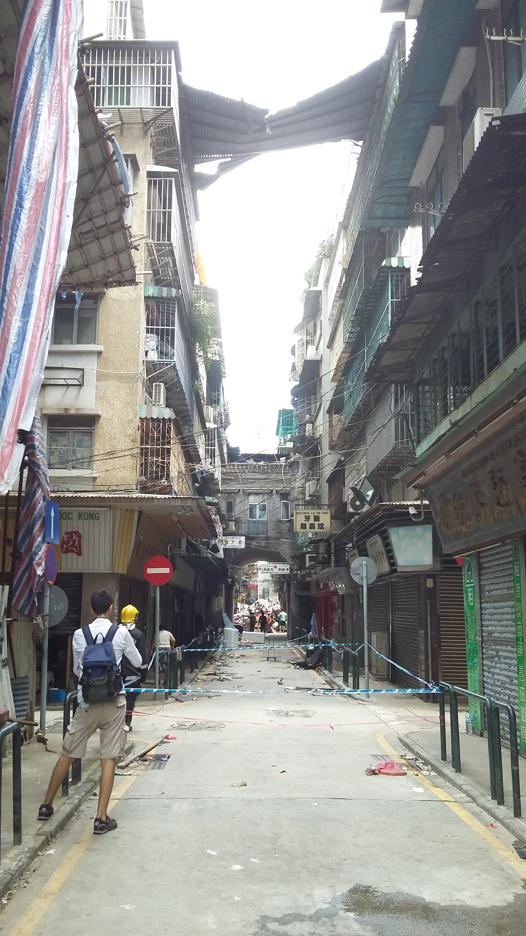 風暴過後第二日，風順堂區情況。